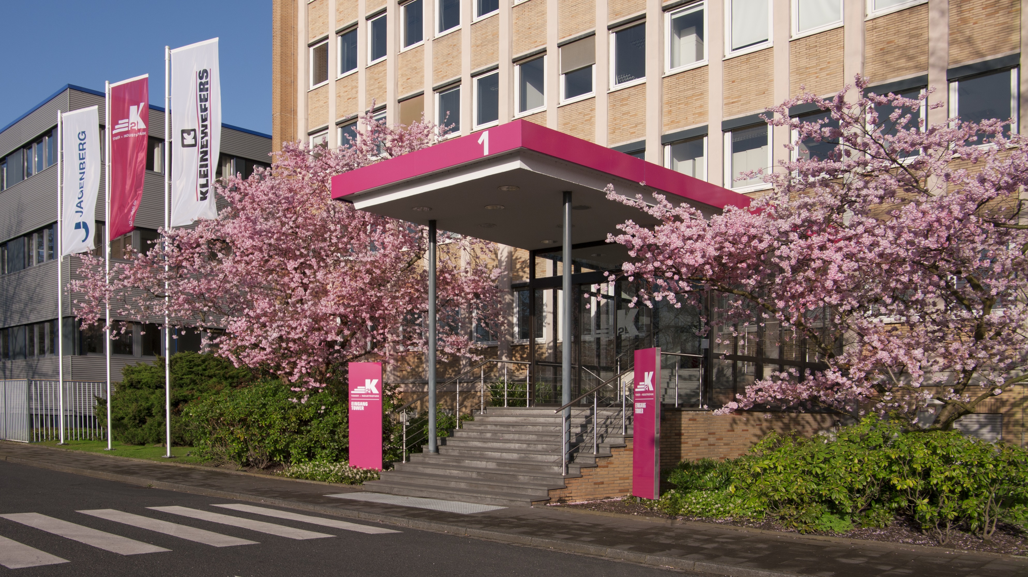 Jagenberg AG, Headquarter Krefeld, Kleinewefersstraße